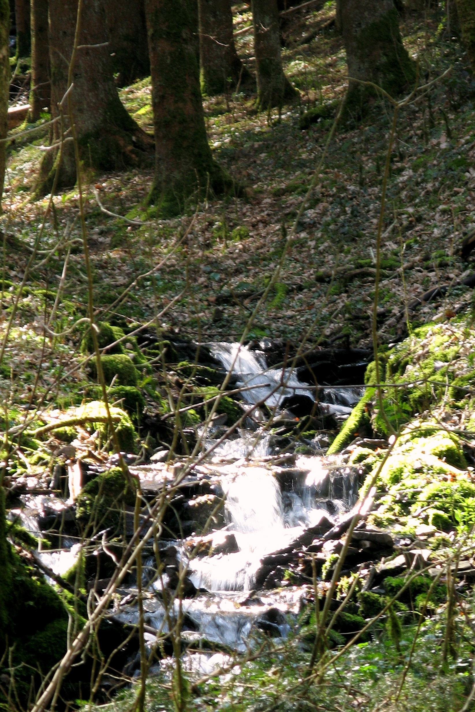 D'Wëlzerbaach vum Bëschwee an der Schinneschleed gesinn.